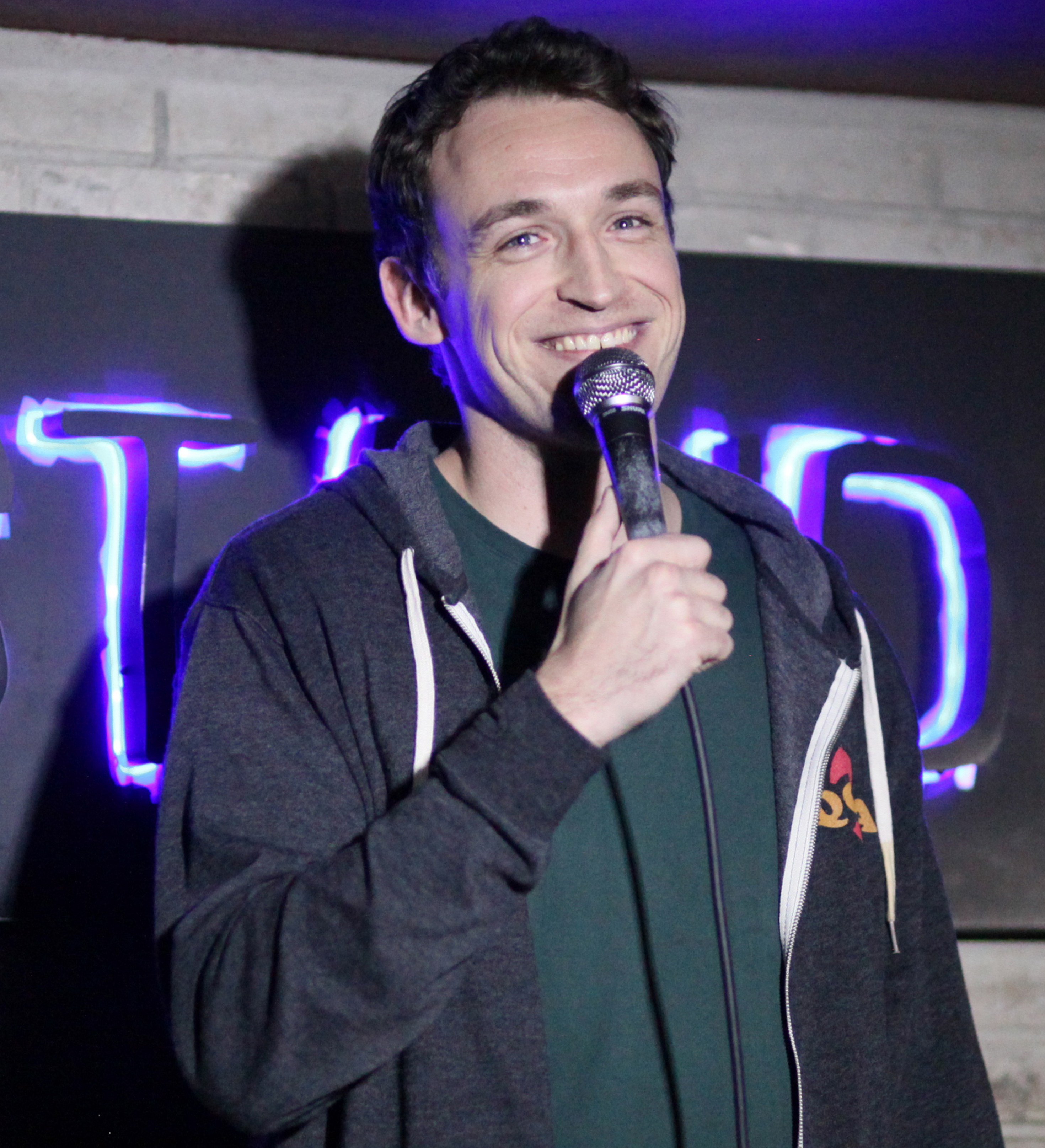 Soder performing in November 2016